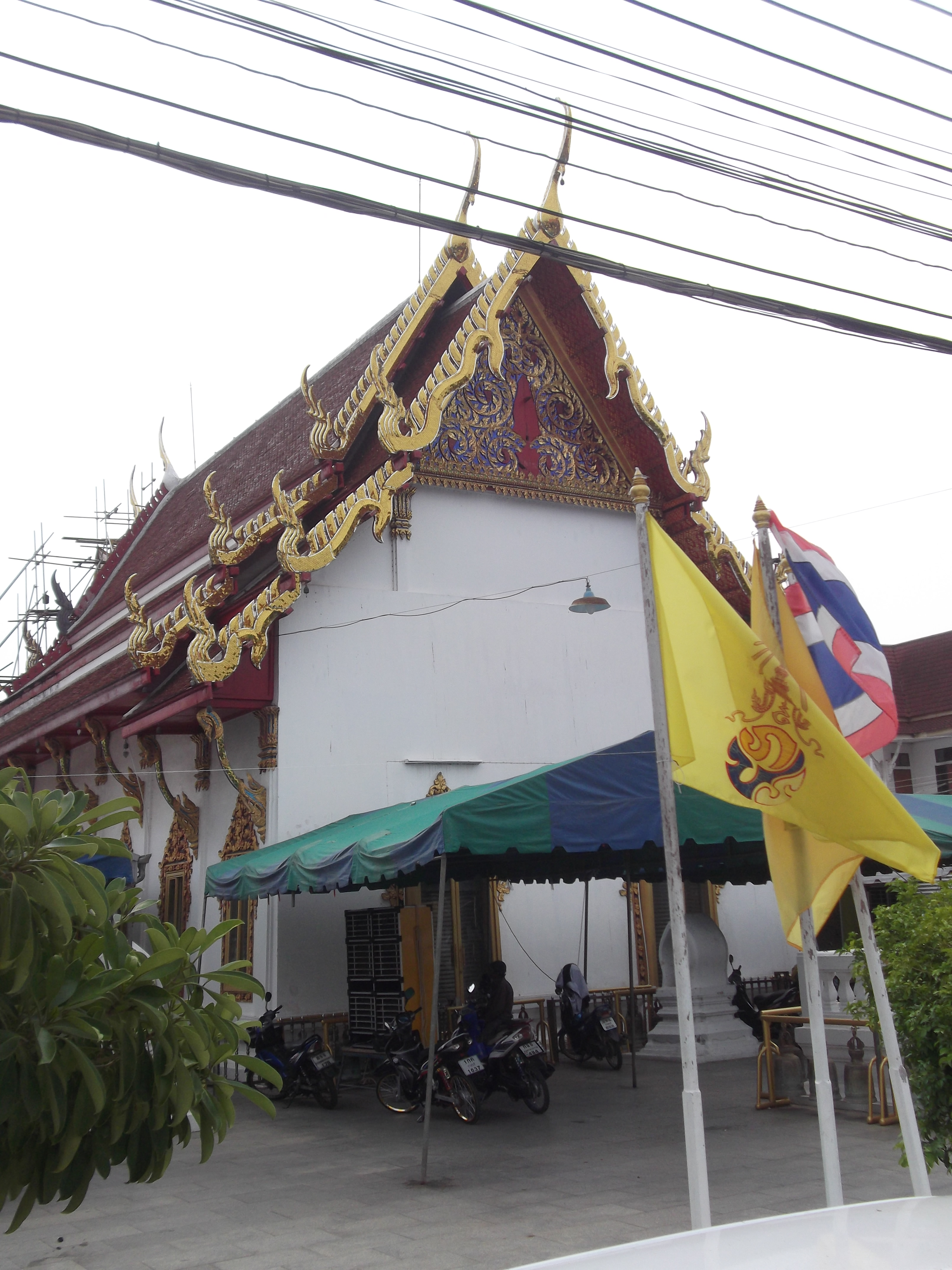 วัดบ้านแหลม(วัดเพชรสมุทรวรวิหาร)